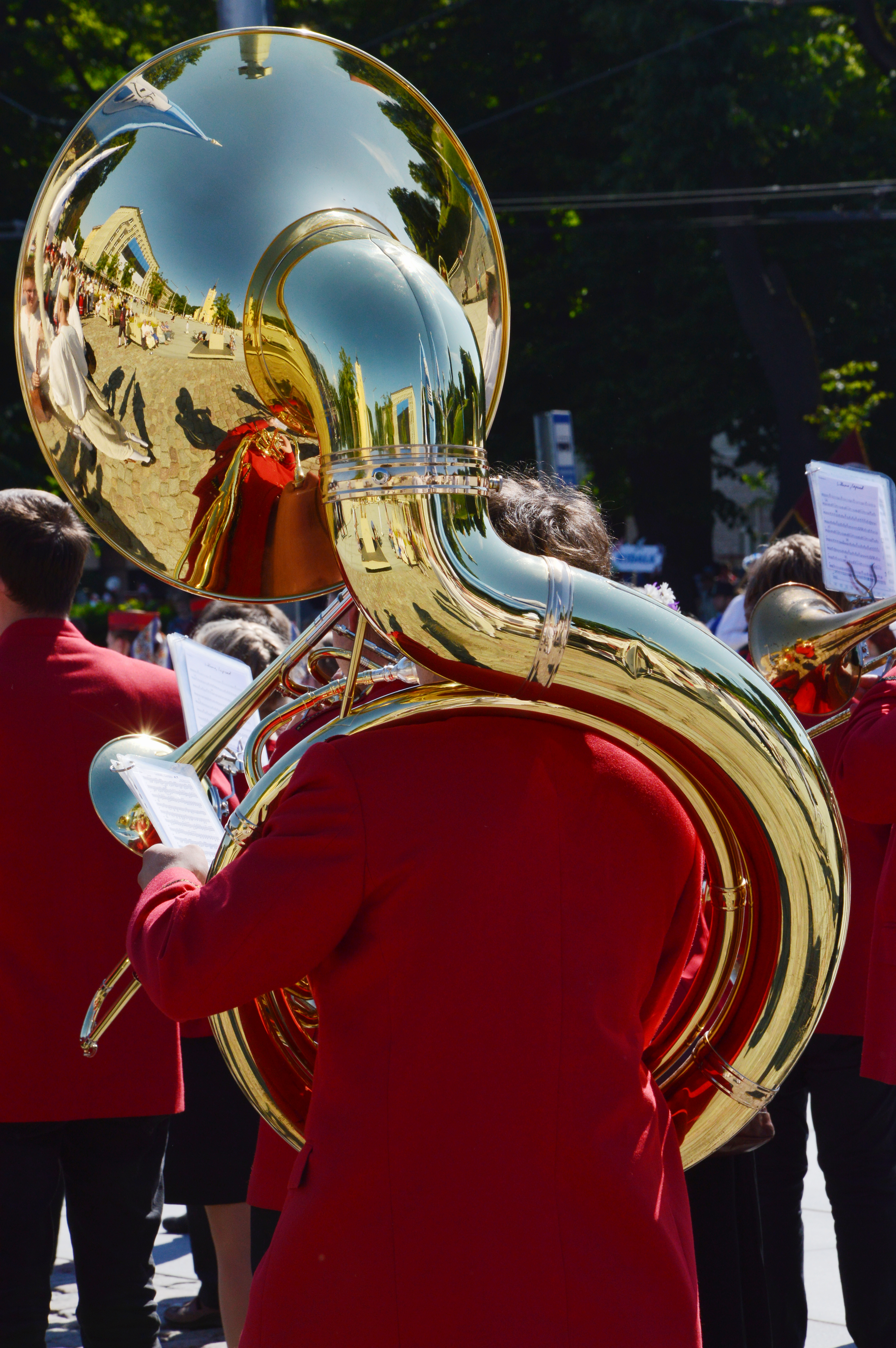 Helikonimängija Vabaduse väljakul ootamas XXVI üldlaulupeo rongkäigu edenemist.